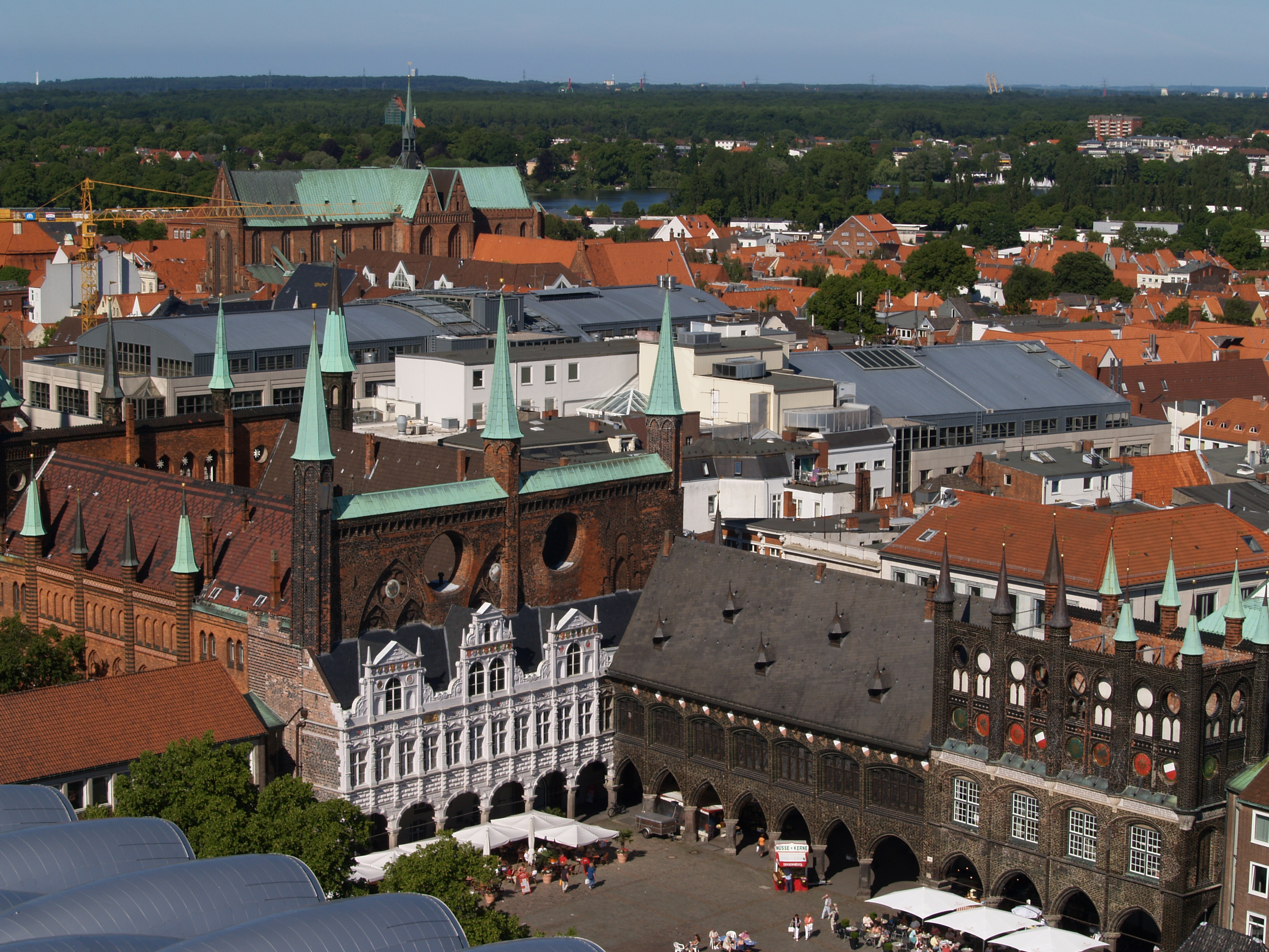 Rathaus von Lübeck vom Turm der St. Petri Kirche aus gesehen.